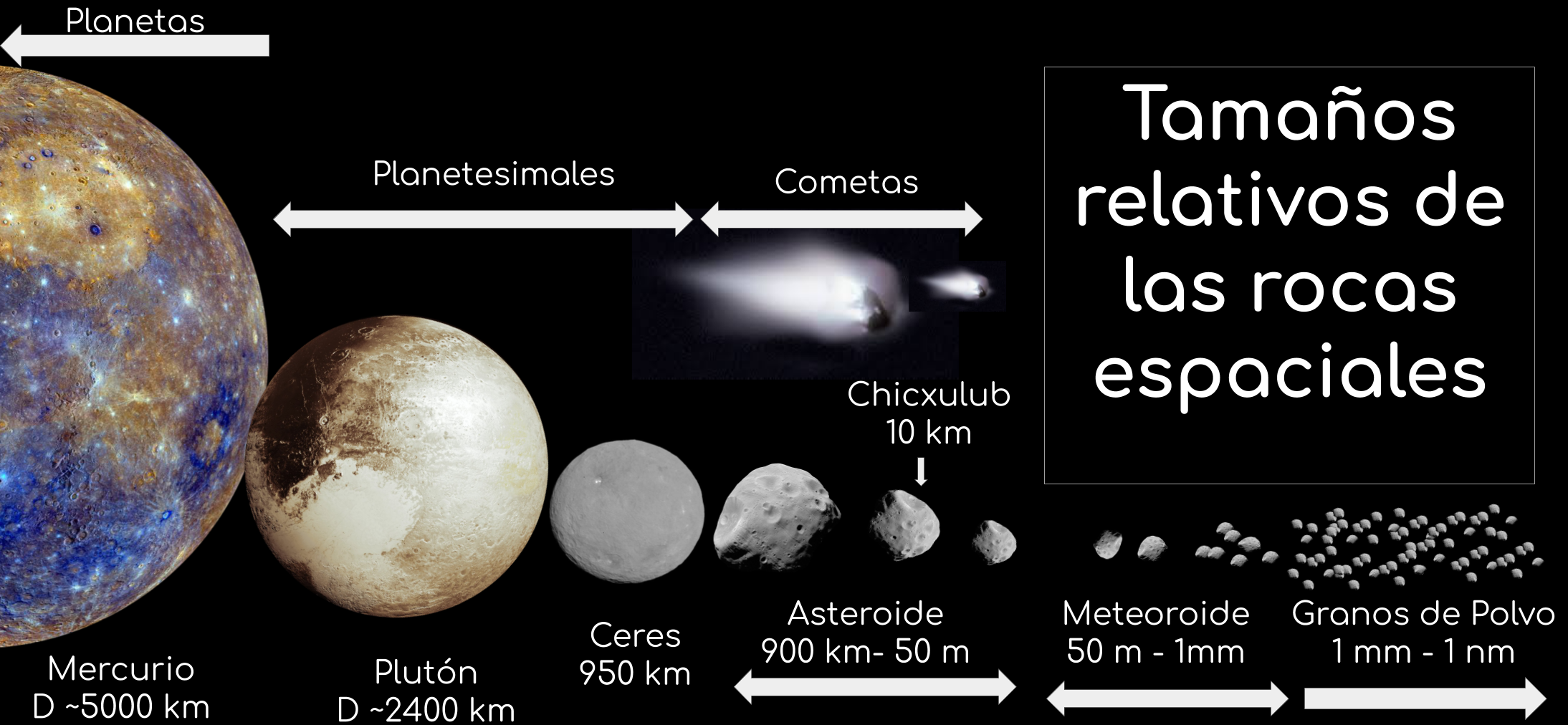 Esquema comparativo con el planeta Mercurio, asteroides , cometas planetesimales.